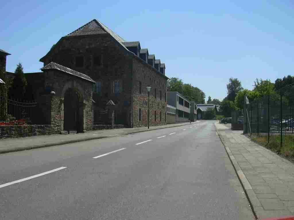 Schneidhausen bei Kreuzau own work papa1234 2006-07-14